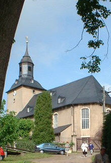 Kirche Krumhermersdorf 2004 (Selbst fotografiert)